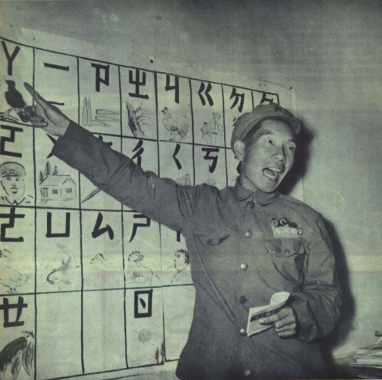 1952年 祁建华和速成识字法